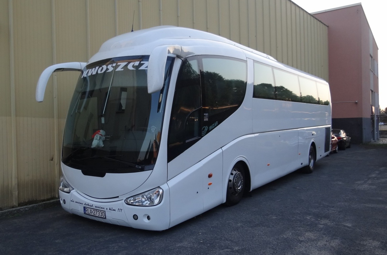 Sokół Łańcut, mecz ze Spójnią (12.05.2018)